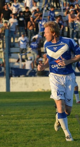 Federico Lussenhoff vistiendo la camiseta de Sportivo Rivadavia de Venado Tuerto en el Argentino B 2013